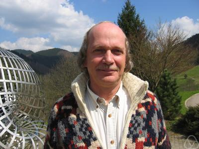 Foto di Peter Rentrop